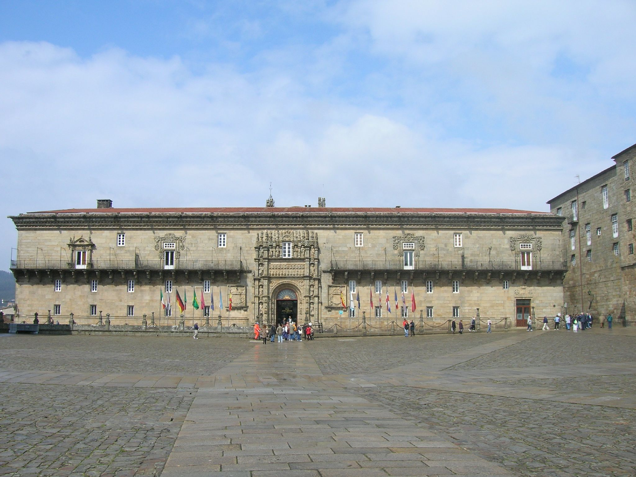 En la plaza del Obradoiro de Santiago de Compostela, entre la Catedral y el Pazo de Raxoi, se encuentra esta bella construcción mandada construir por los Reyes Católicos como hospital de peregrinos. En la actualidad alberga el Parador de Santiago de Compostela.